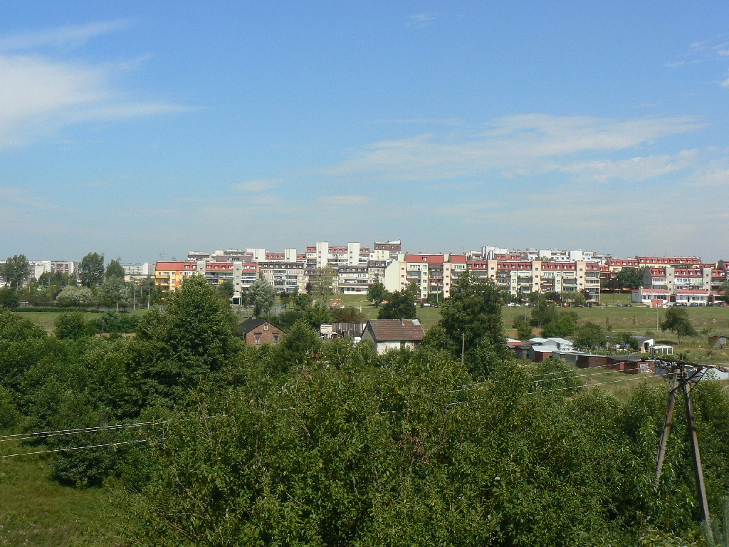 osiedle Binków w Bełchatowie, widok z bełchatowskiego torowiska